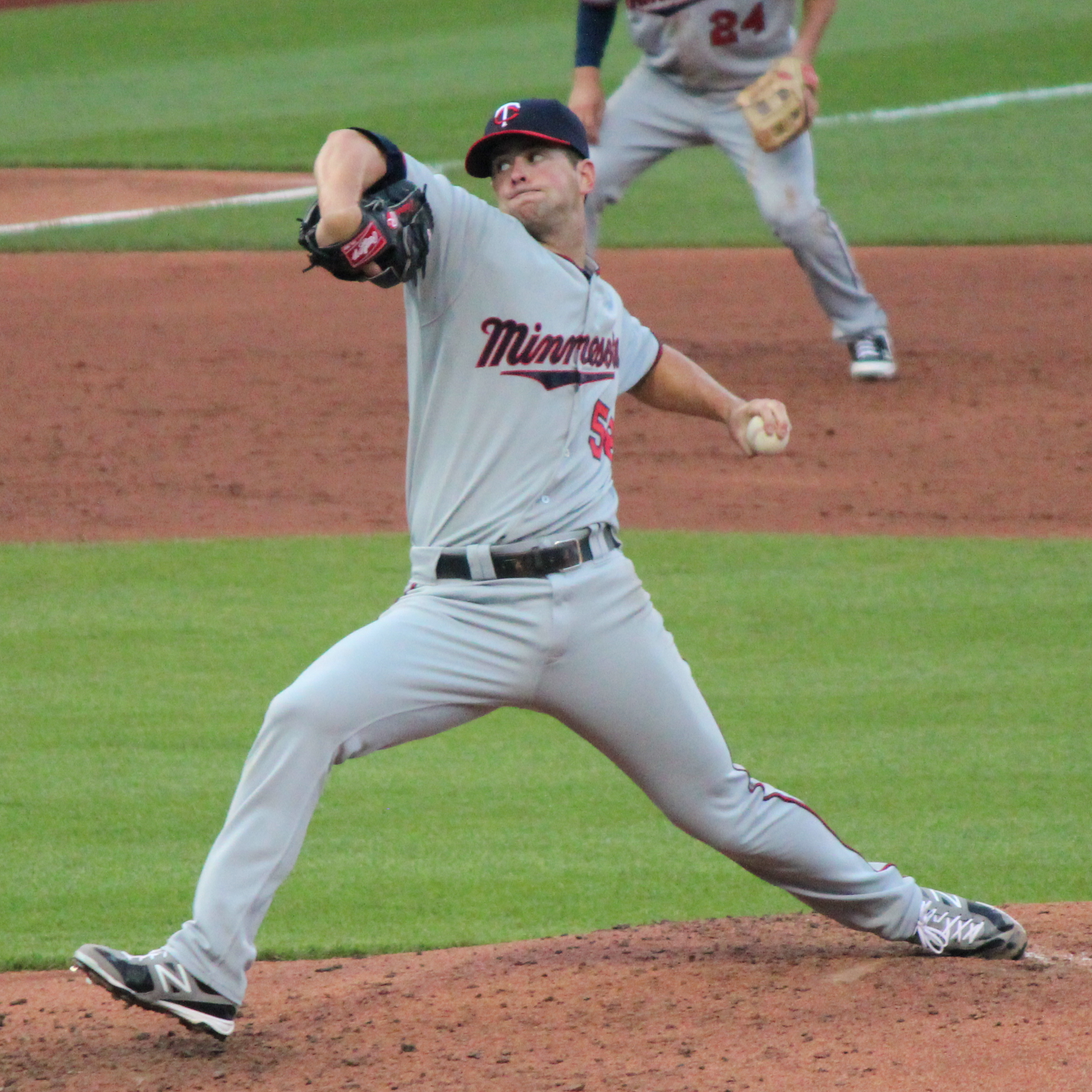 Scott Diamond